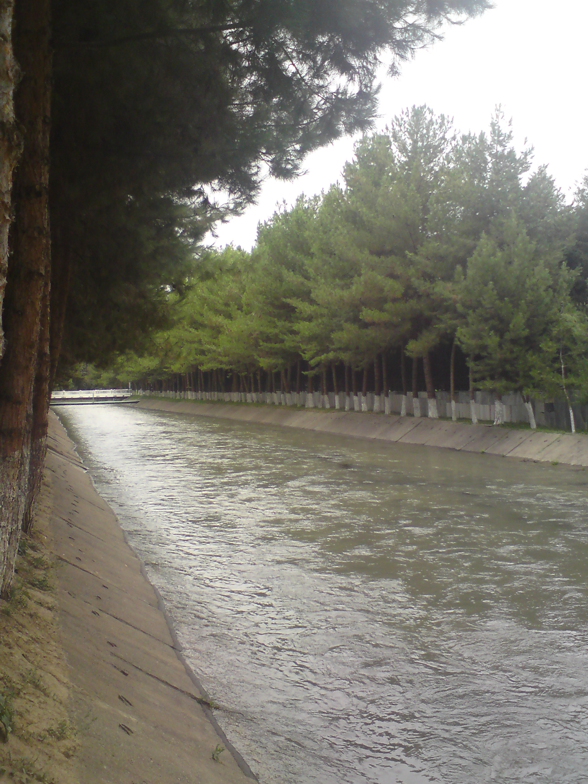 Сосны на берегу канала (преобразованного протока реки Чирчик) Карасу (Правобережный), город Ташкент, близ академии милиции